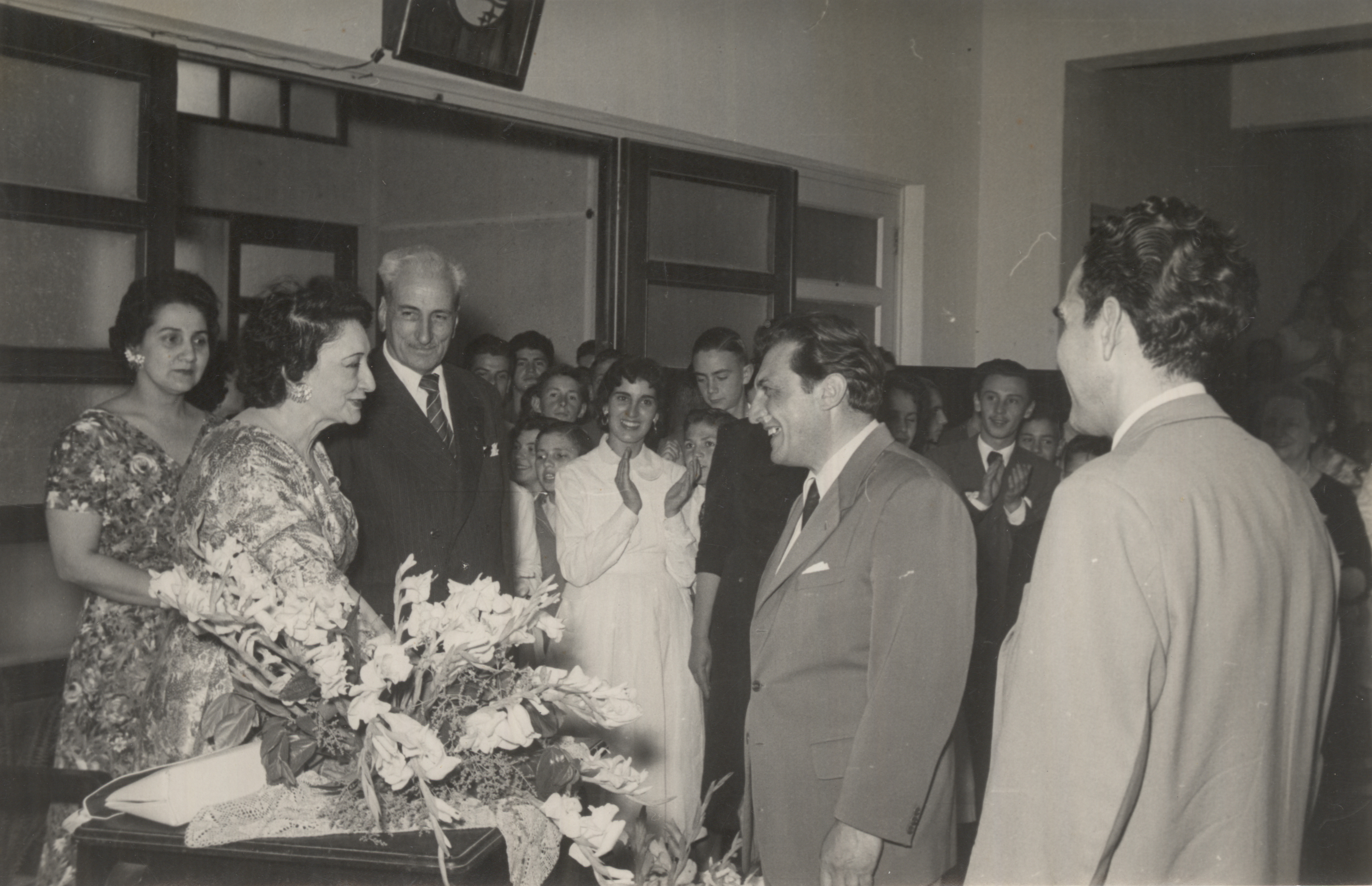 Visita de Juana de Ibarbourou al Liceo Departamental de Durazno (Uruguay)